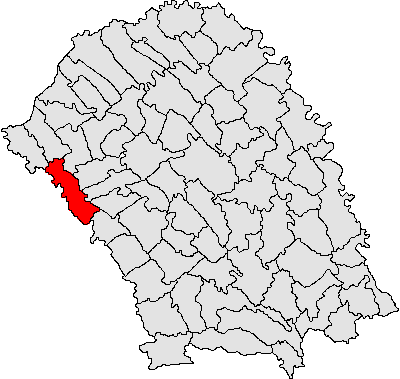 Categorie:Hărţi ale judeţului Botoşani